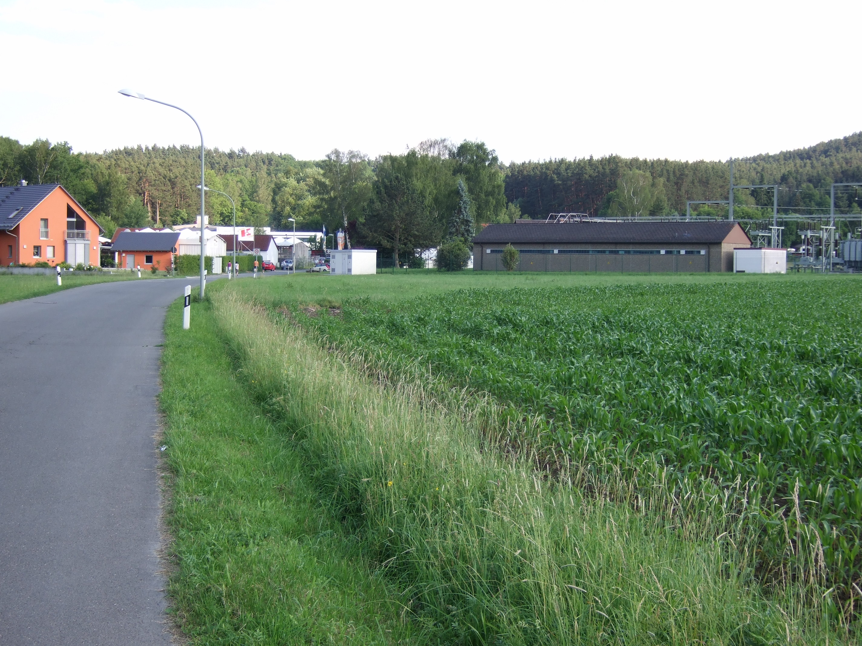 An der Bärenleite, Saas, Bayreuth